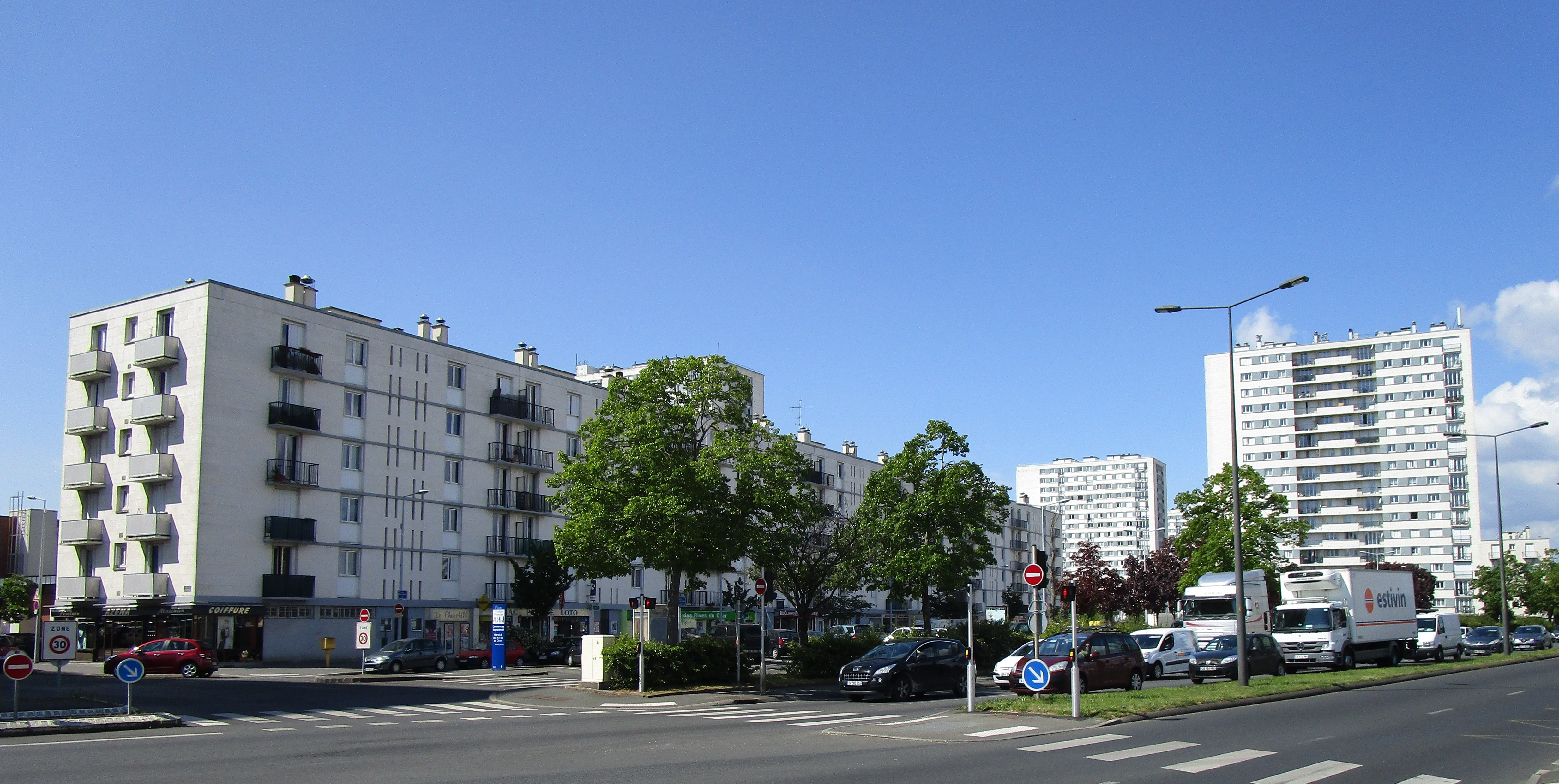 Boulevard Winston Churchill dans le quartier des Rives du Cher, à Tours.